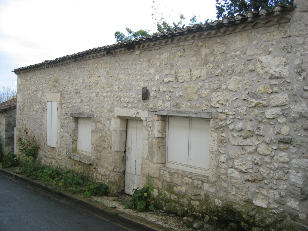 Maison XVIIe siècle Lieu : bourg de Soumensac Date de prise de vue : novembre 2006 Auteur : Jacques David